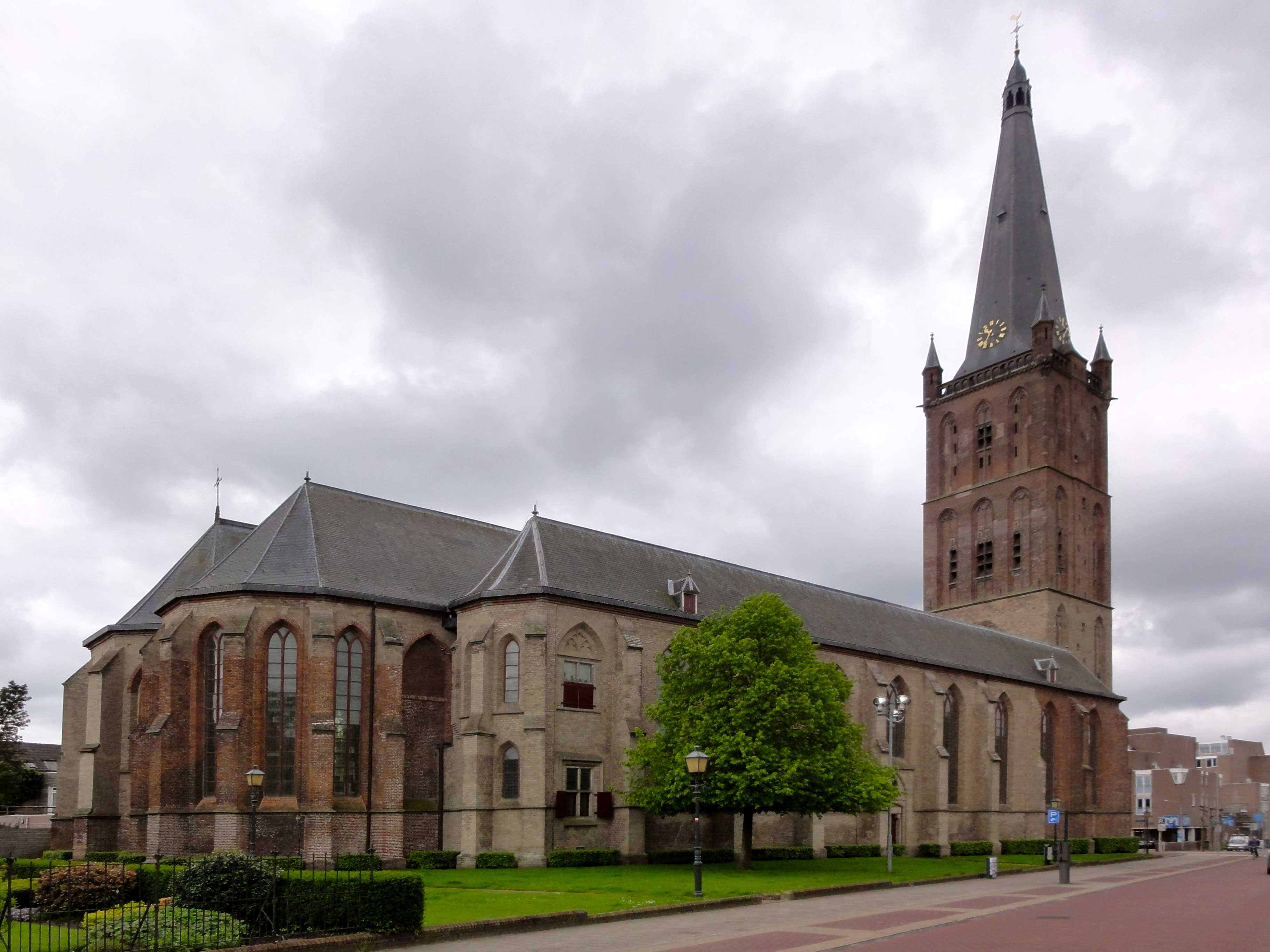 Clemenskerk Kerkstraat 22 te Steenwijk (rijksmonument)